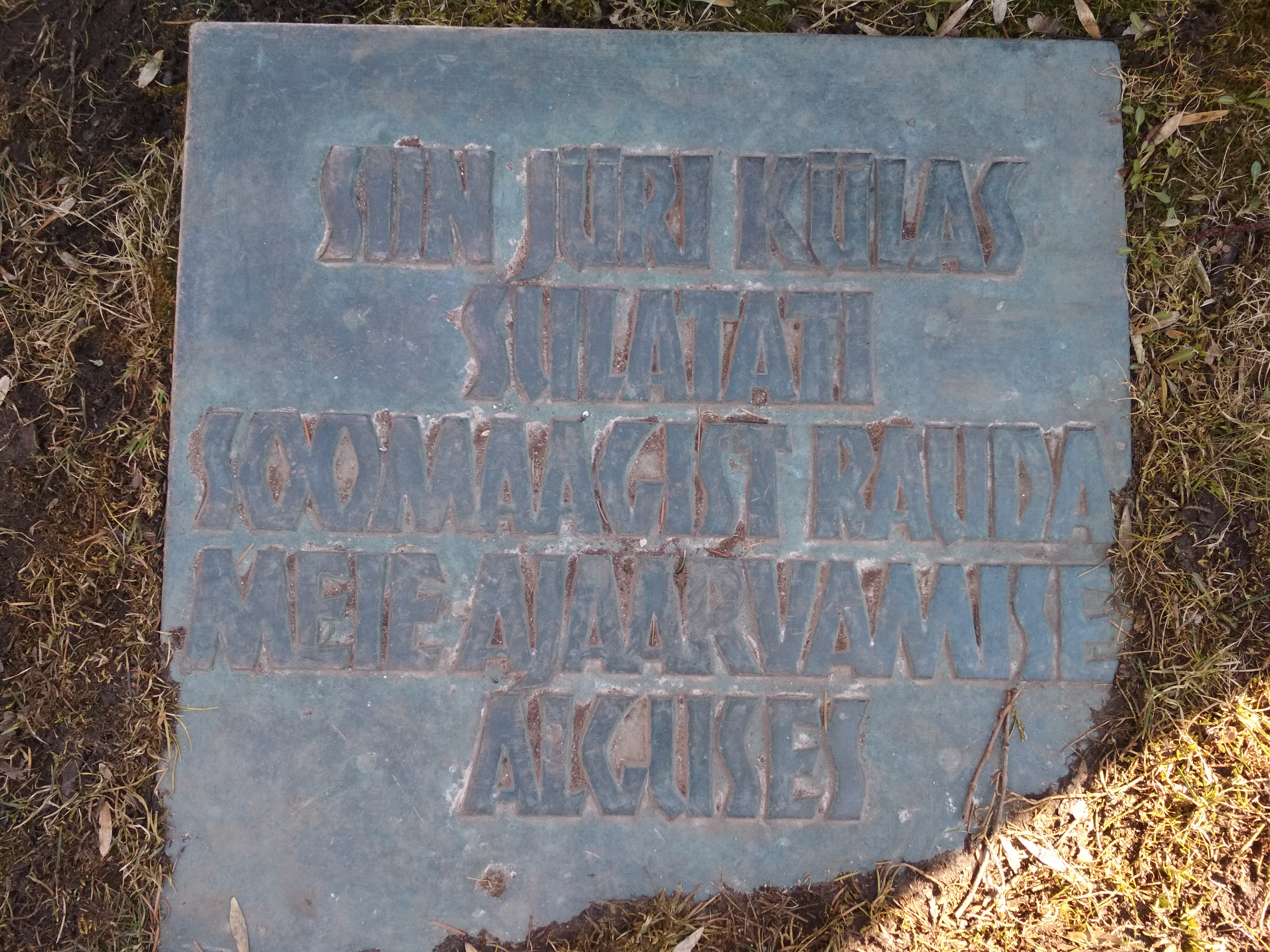 Jüri rauasulatuskoha mälestusplaat (Jüri alevik)